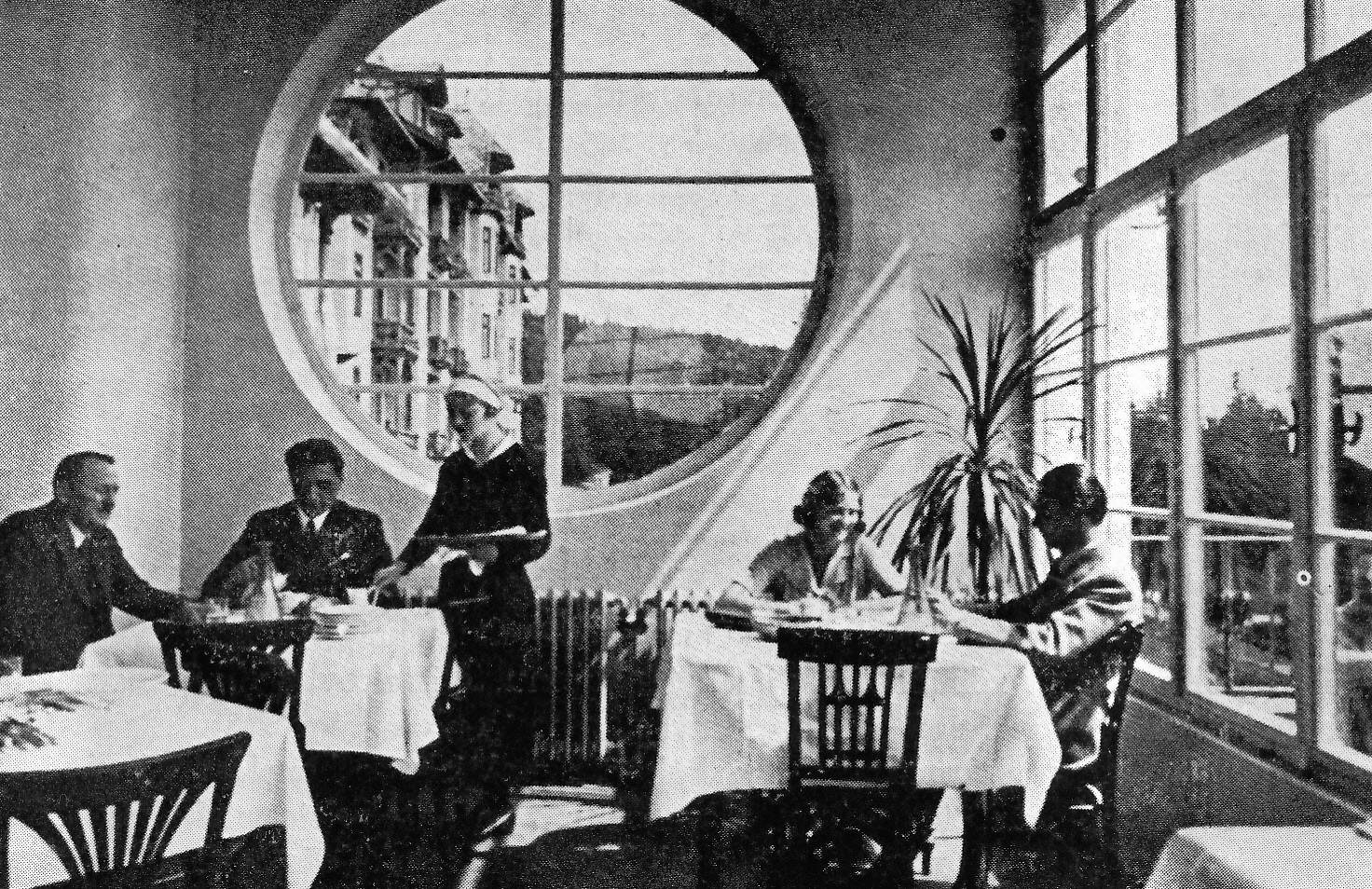 Hotelová jedáleň - Grand Starý Smokovec